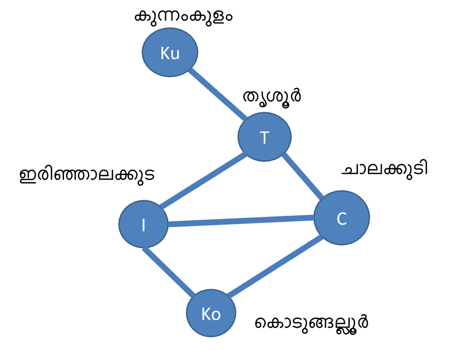 കേരളത്തിലെ ചില നഗരങ്ങൾ തമ്മിലുള്ള റോഡ് ബന്ധം കാണിയ്ക്കുന്ന ലേഖ